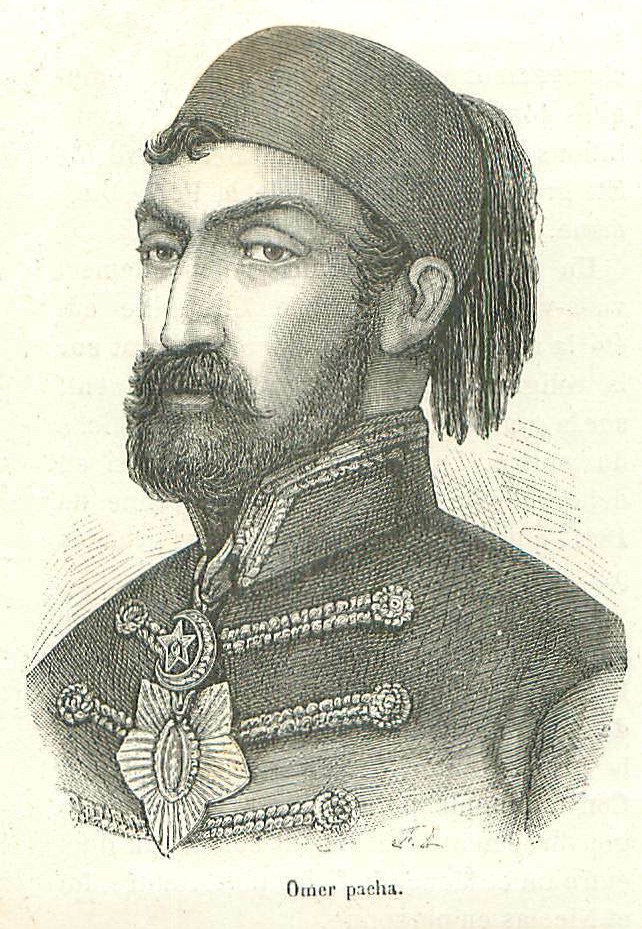 Ömer Paşa - Gravür (1806-1871)